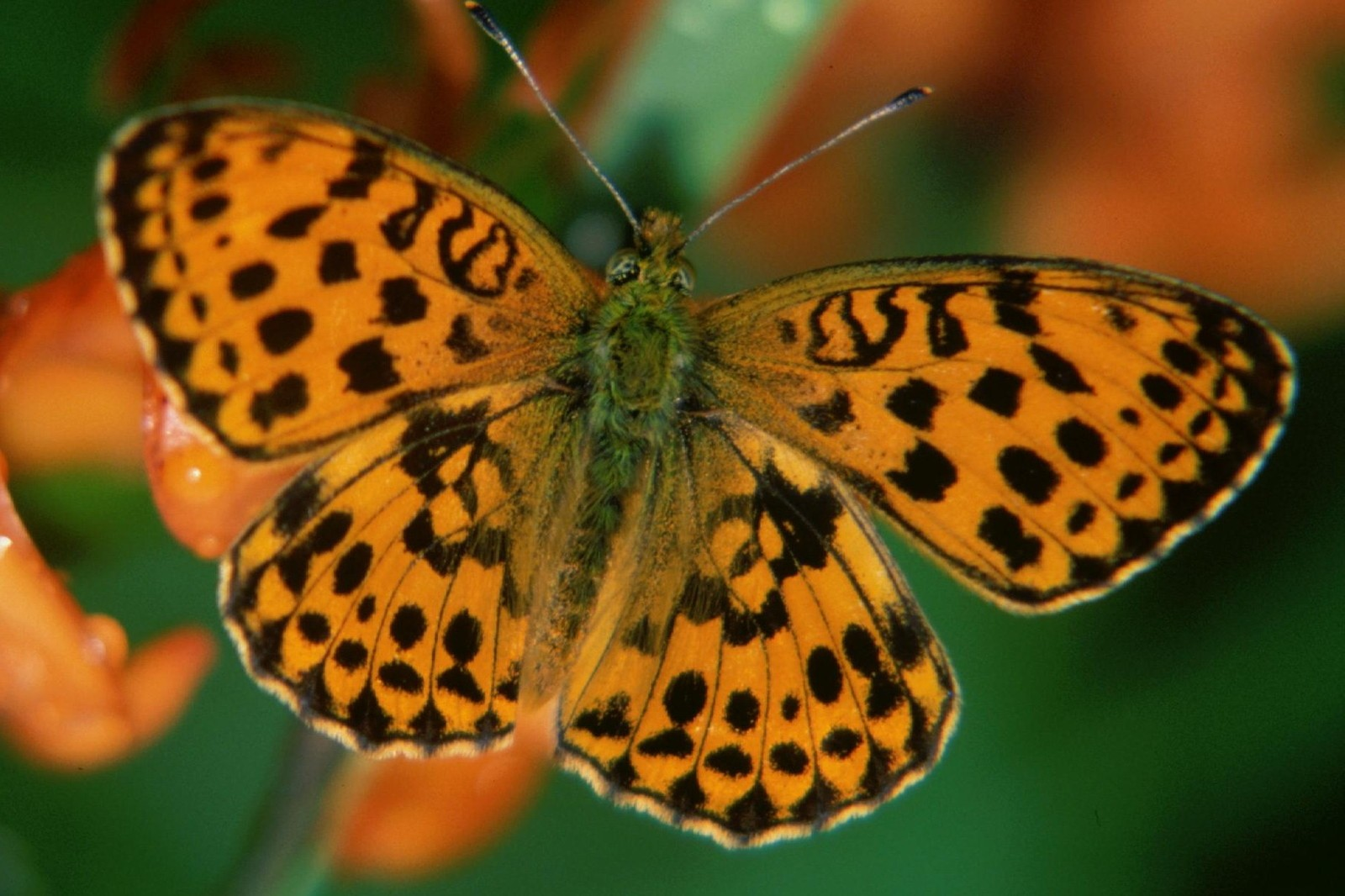 クルマユリに留まるコヒョウモンの雄 朝日岳にて